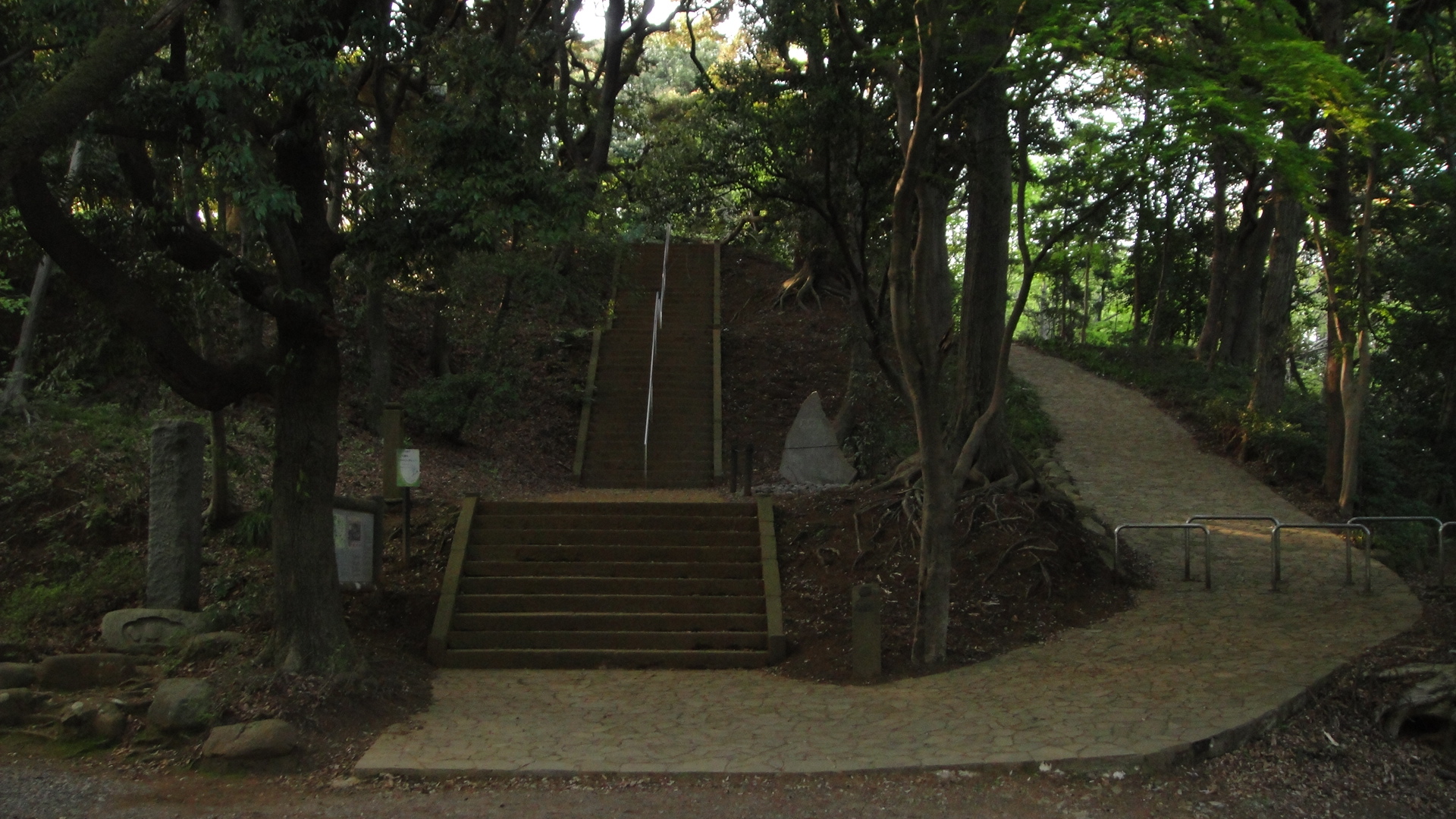 大塚山公園